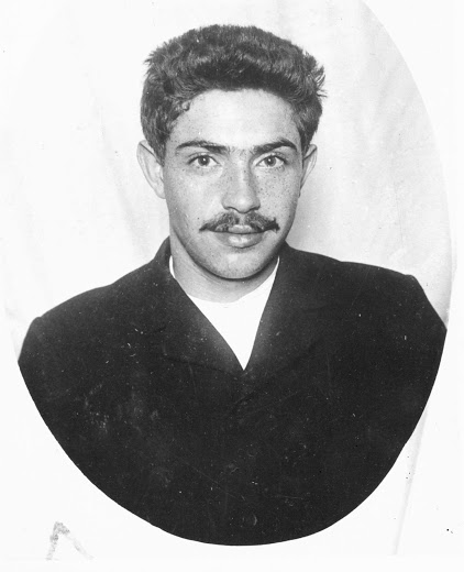 Lejba Vul'fovič Sikorskij (1884-1927)